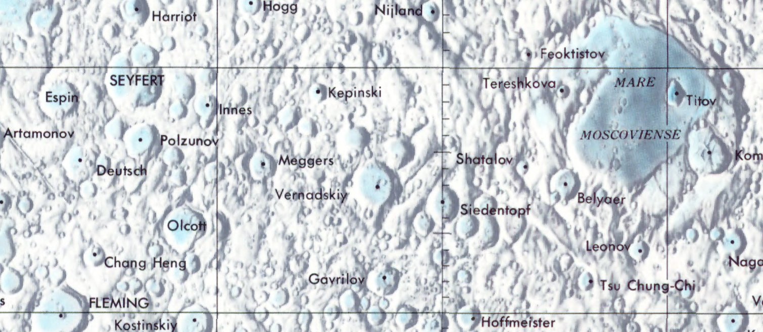 Cráter lunar Vernadskiy. Localización. (Lunar Chart LPC1. Second Edition)